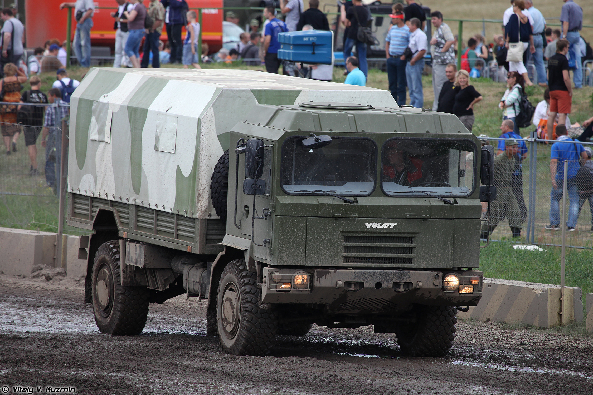 МЗКТ-5002 (MZKT-5002)